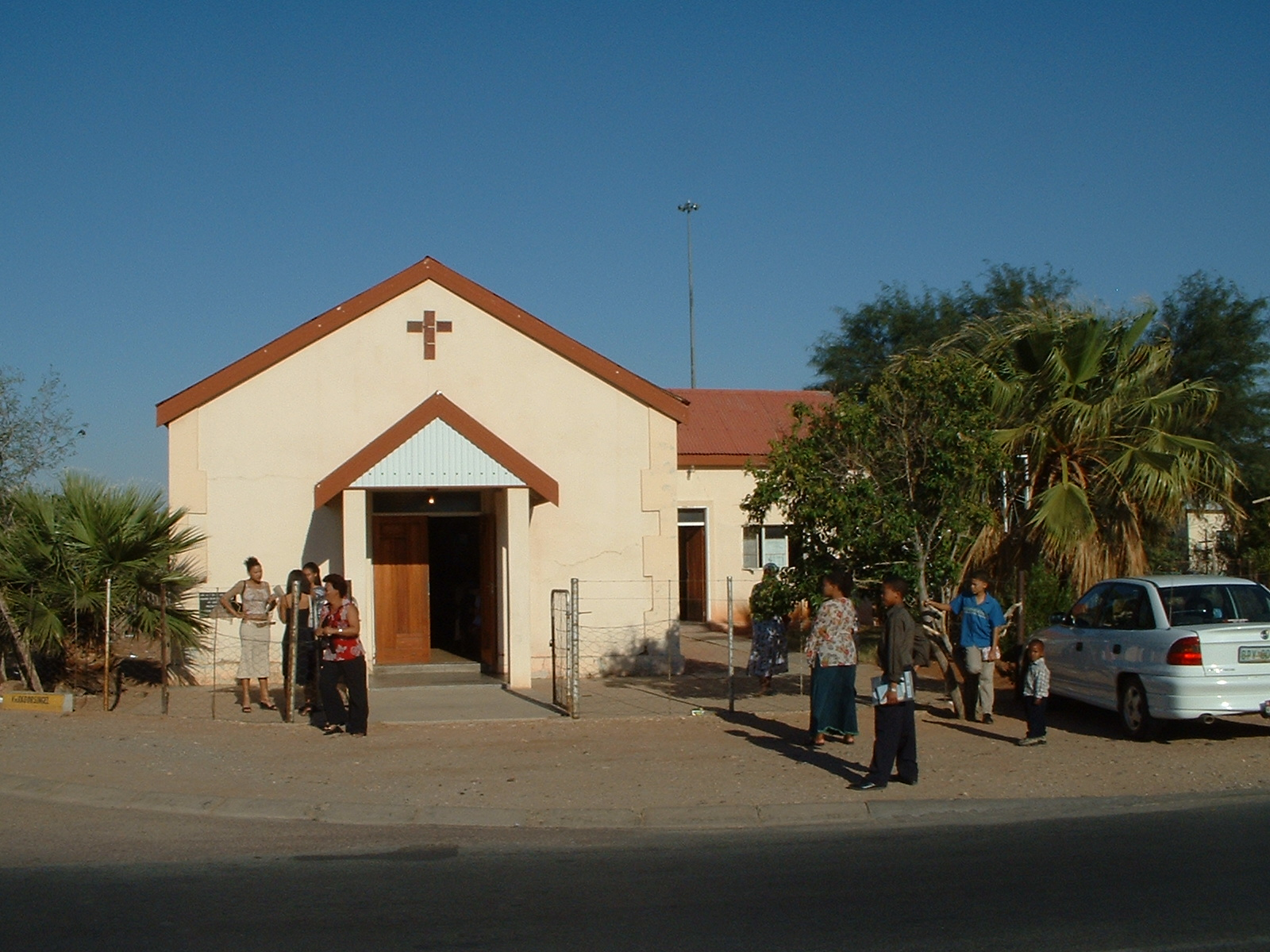 Lutherse kerk in Upington - Progress, Suid-Afrika